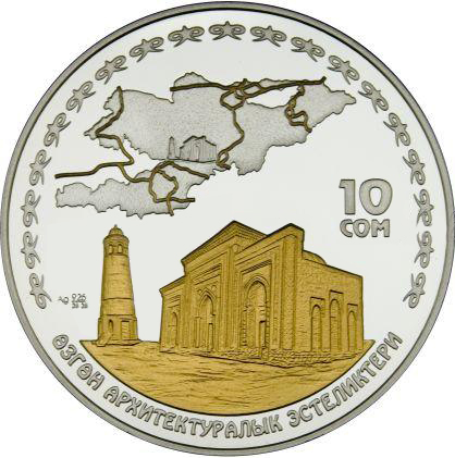 Памятная монета Кыргызстана "Узгенский архитектурный комплекс" из серии «Кыргызстан на Великом шёлковом пути» - 10 сом 2008 - Серебро 925 Кыргызча: Өзгөн архитектуралык эстеликтери